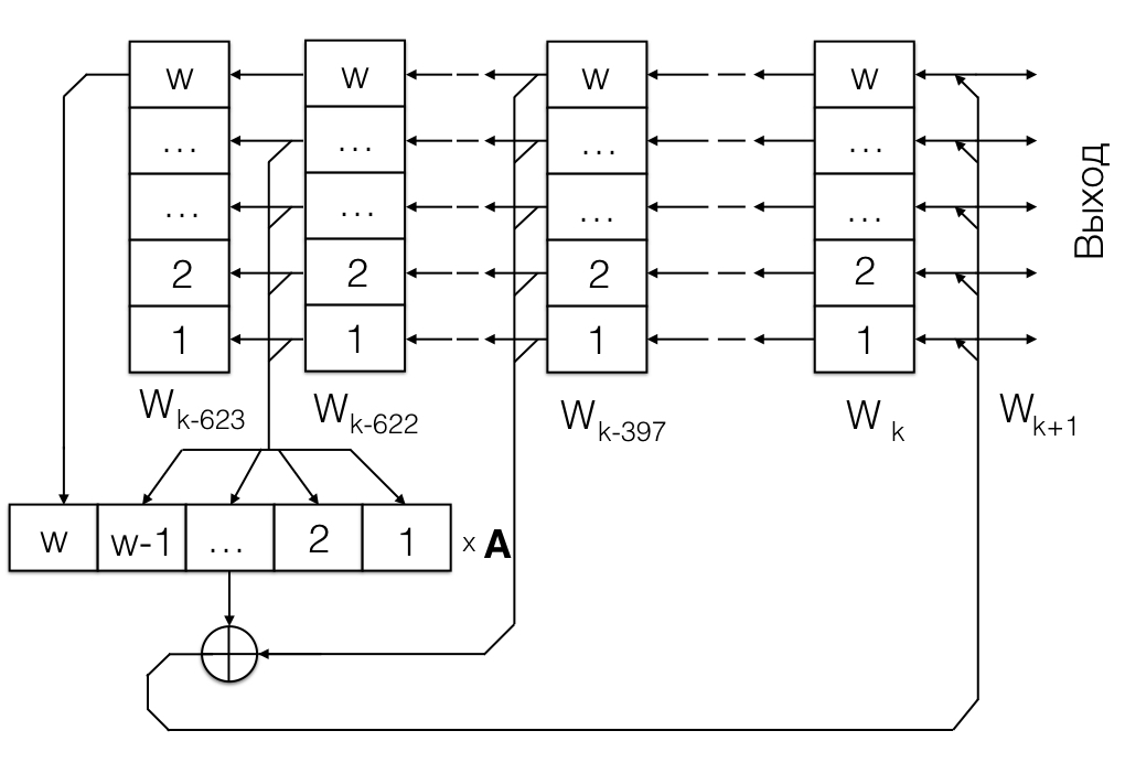 упрощенная схема вихря Мерсенна